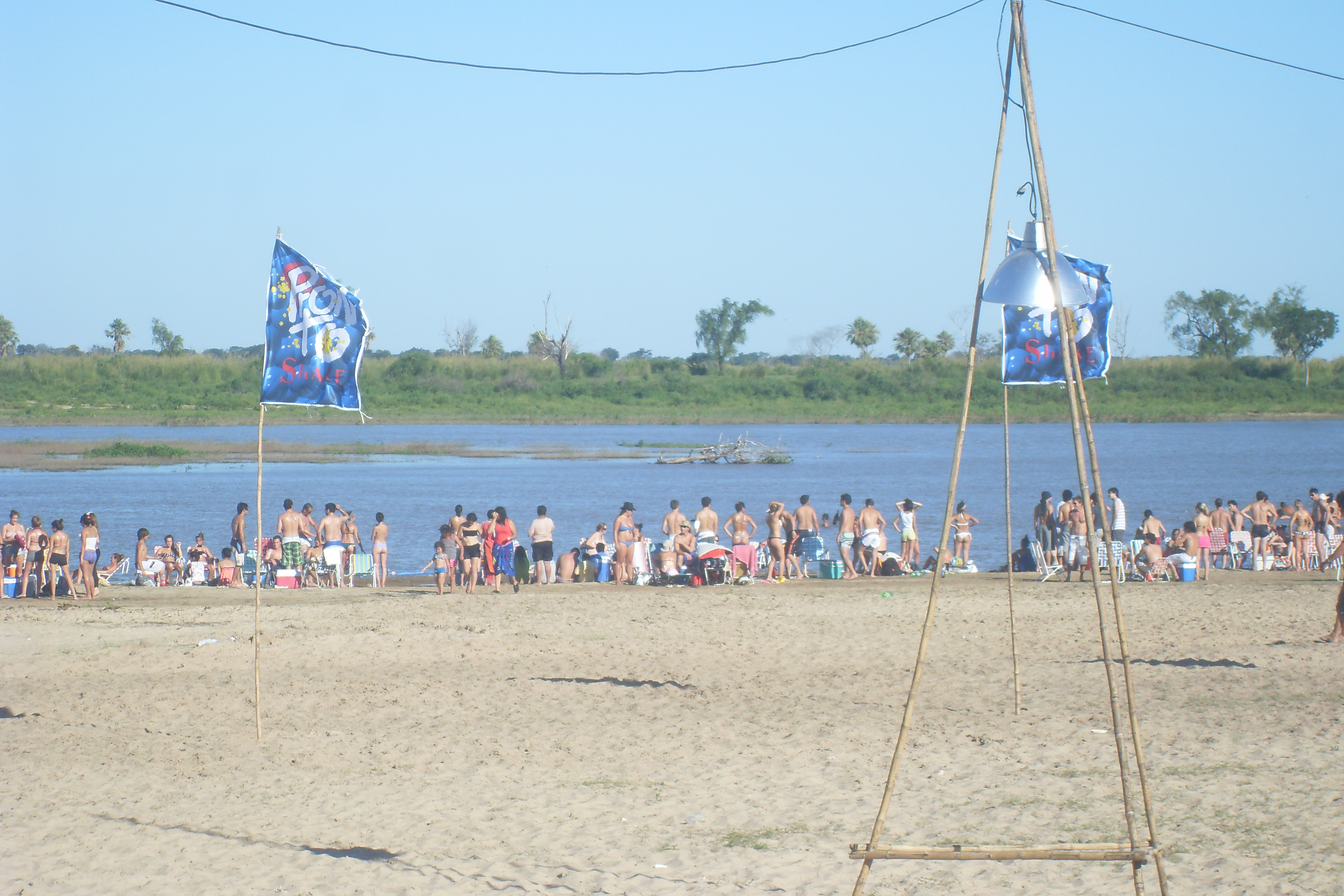 Playa de la Ciudad de Villa Ocampo en Villa San Vicente, sobre el Río Paraná Miní.